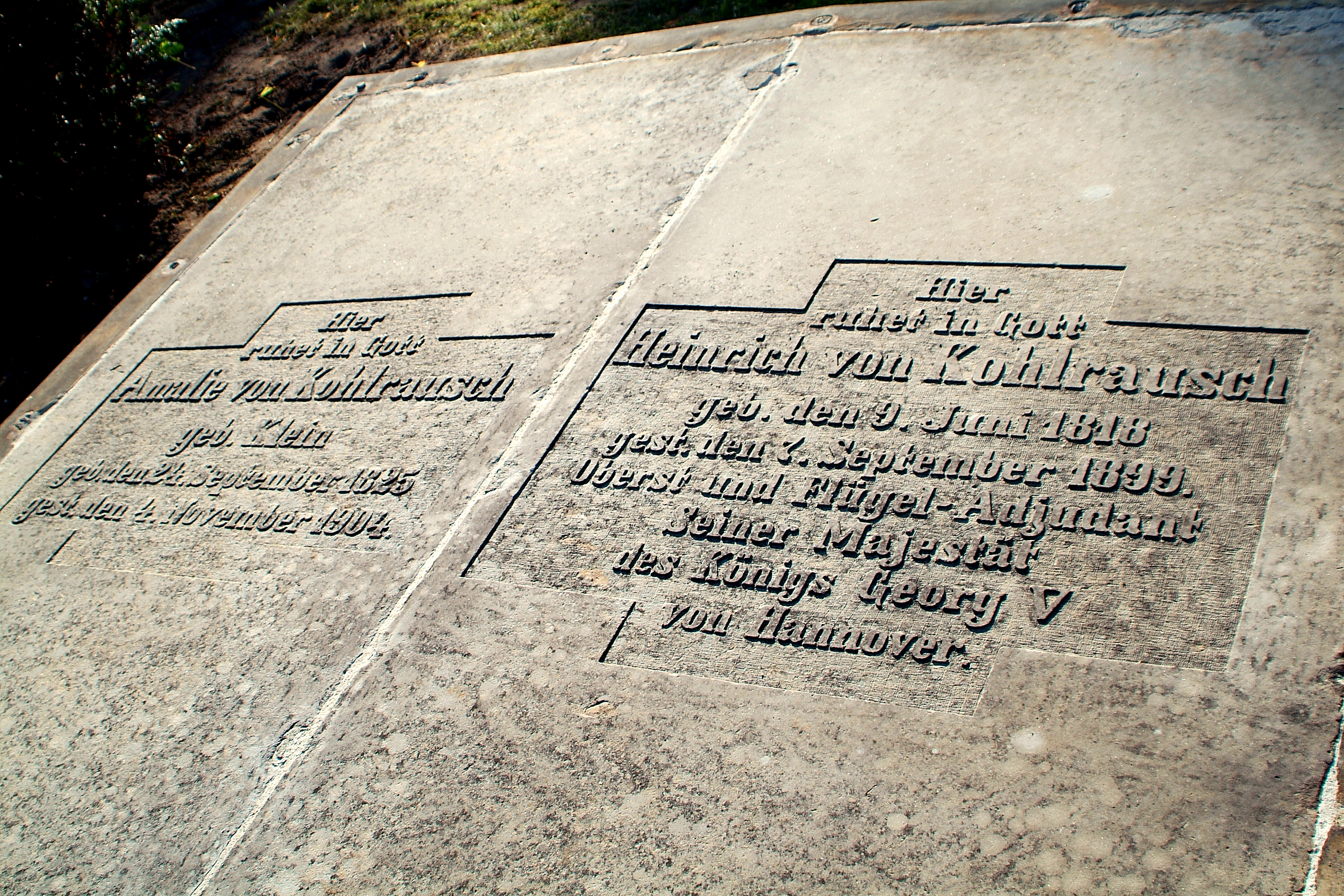 Denkmalgeschützte Doppel-Grabplatte auf dem Herrenhäuser Friedhof in Hannover: Hier ruht in Gott, Amalie von Kohlrausch, geb. Klein, geboren den 25. September 1825, gestorben den 4. November 1904, und ... Heinrich von Kohlrausch, geb. den 9. Juni 1818, gest. den 7. September 1899, Oberst und Flügel-Adjutant seiner Majestät des Königs Georg V. von Hannover ...